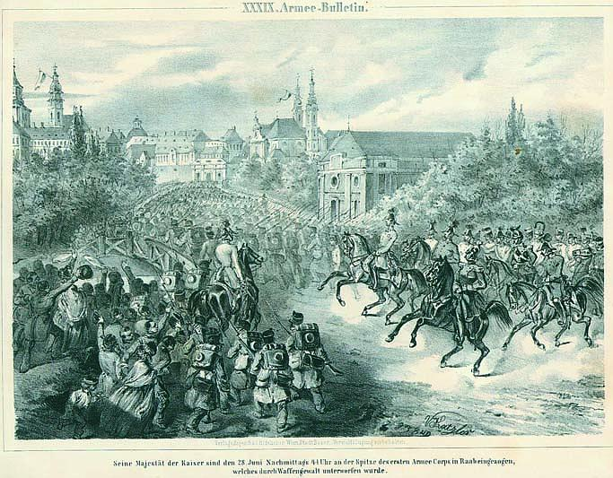 I. Ferenc József bevonulása Győrbe, az 1849. június 28-án lezajlott ütközet után. Az Armee-Bulletin 39. lapja